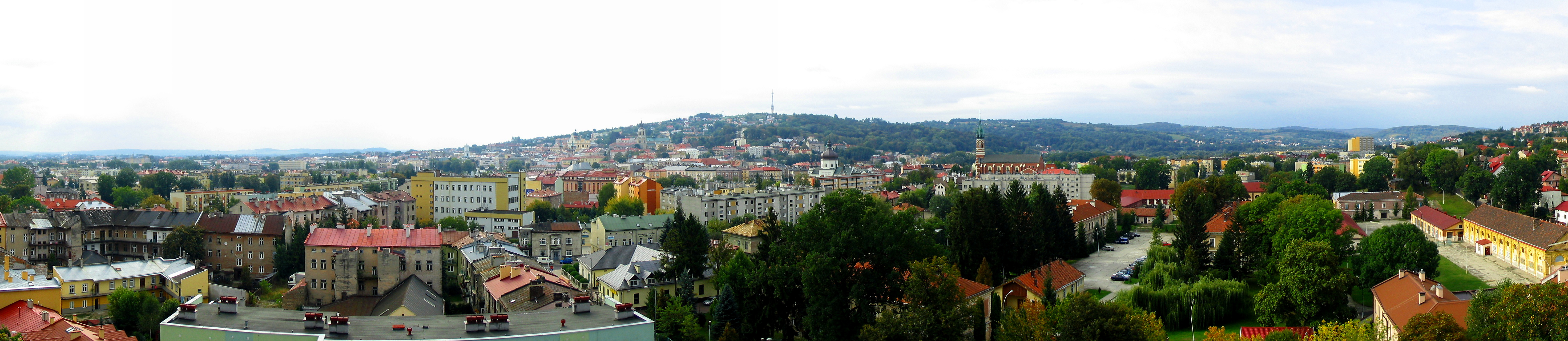 Panorama Przemyśla (widok z dzielnicy Zasanie)